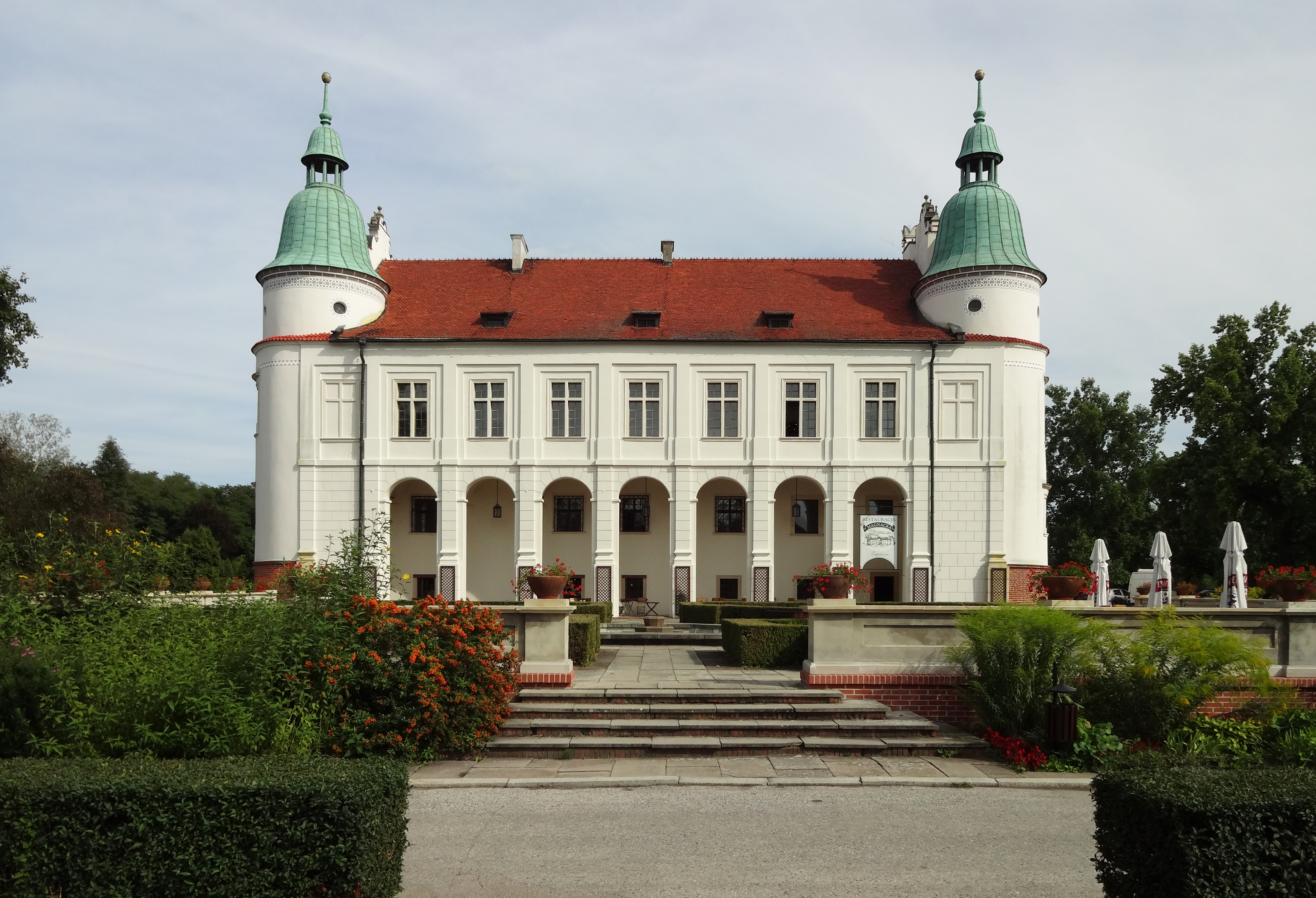 Baranów Sandomierski - późnorenesansowy zamek, zwany Małym Wawelem (zabytek nr A-682 z 11.12.1967 i z 24.02.1977)